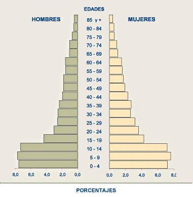 Piramide de la población del cantón Sigchos en la Provincia del Cotopaxi en la sierra del Ecuador